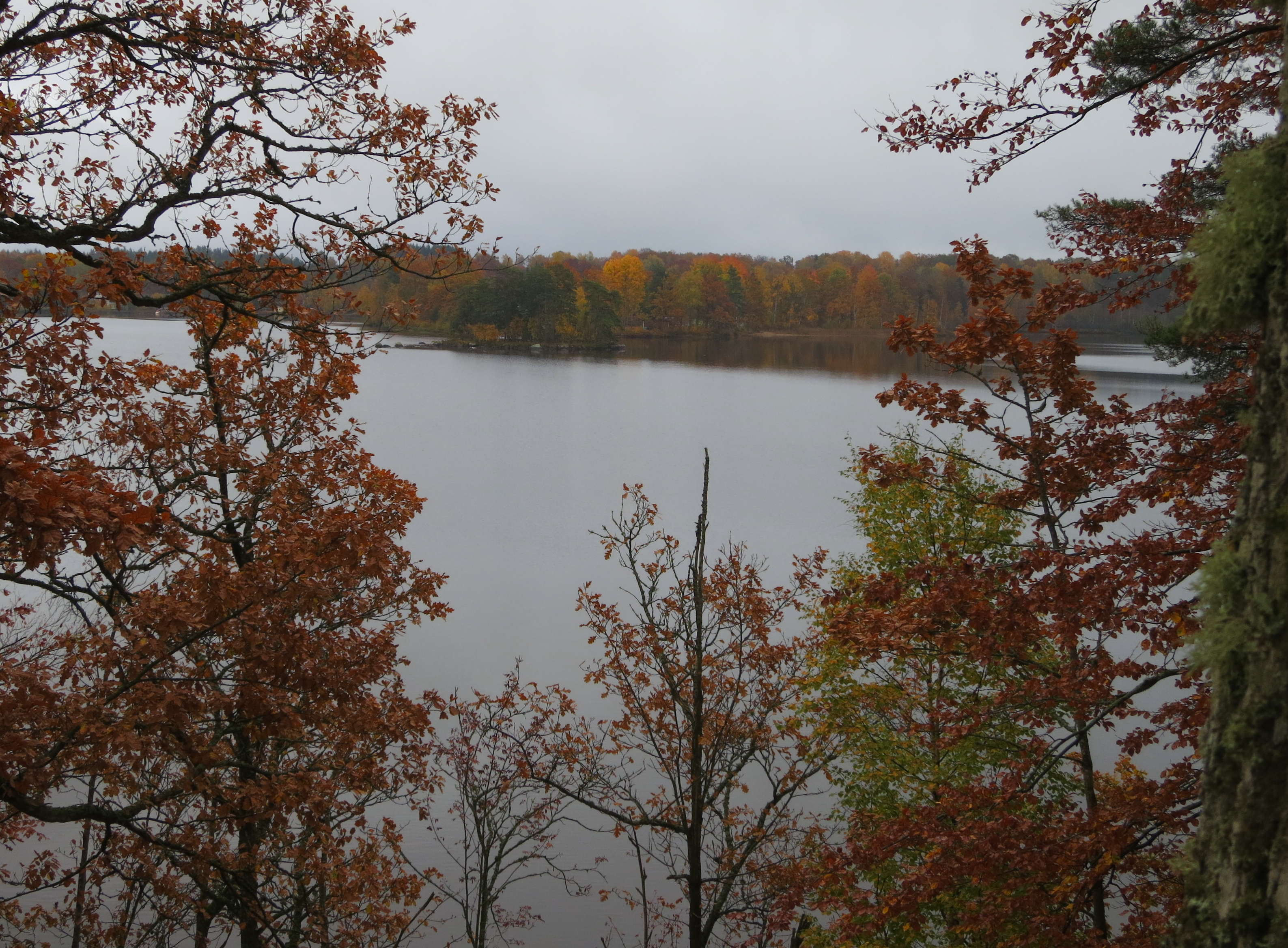 Sjön Sandsjön, Tingsryds kommun